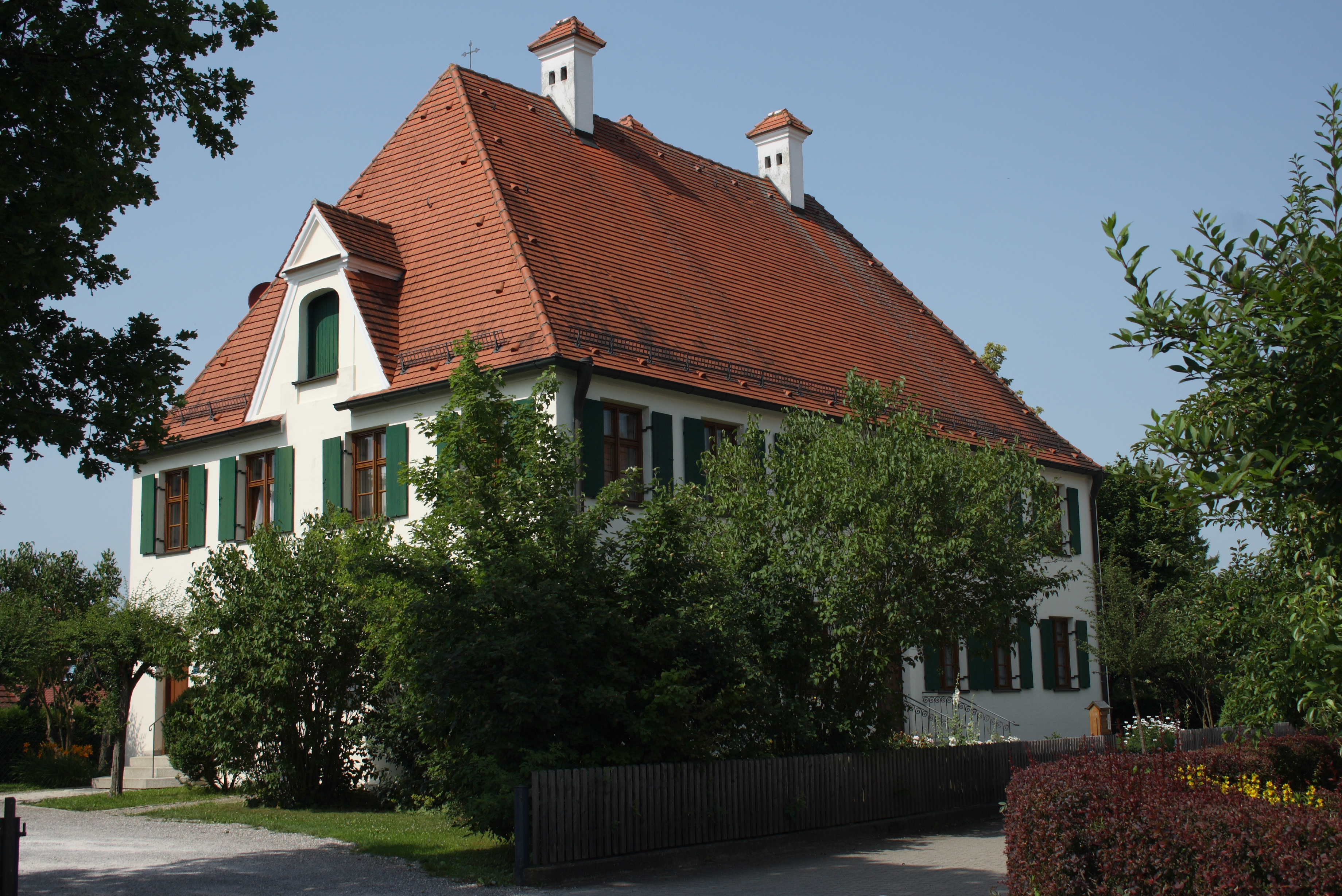 Pfarrhaus in Autenried, einem Stadtteil von Ichenhausen im Landkreis Günzburg (Bayern), Benno-Bichler-Platz 2, Walmdachbau von 1735/40, von Joseph Meitinger